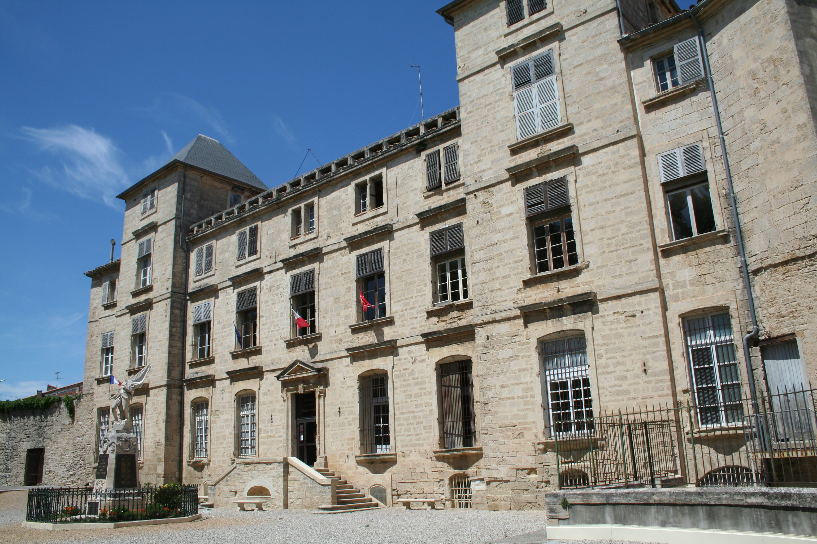 Pignan (Hérault) - Château de Turenne (XVIIe siècle) construit par Gabriel d'Hebles et Henri de Baschi du Cayla, actuelle mairie depuis 1895.